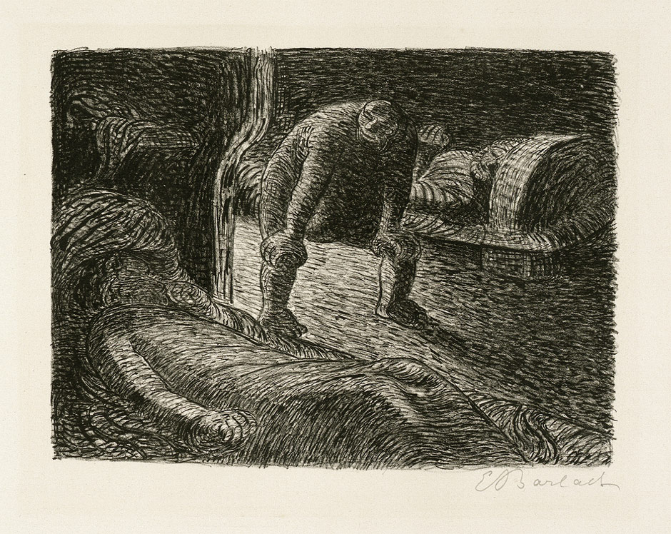 Der Alb. Lithographie 20,8 x 27,5 cm (Darstellung); 1912 Blatt 9 der Ausgabe B der Mappe "Der tote Tag".